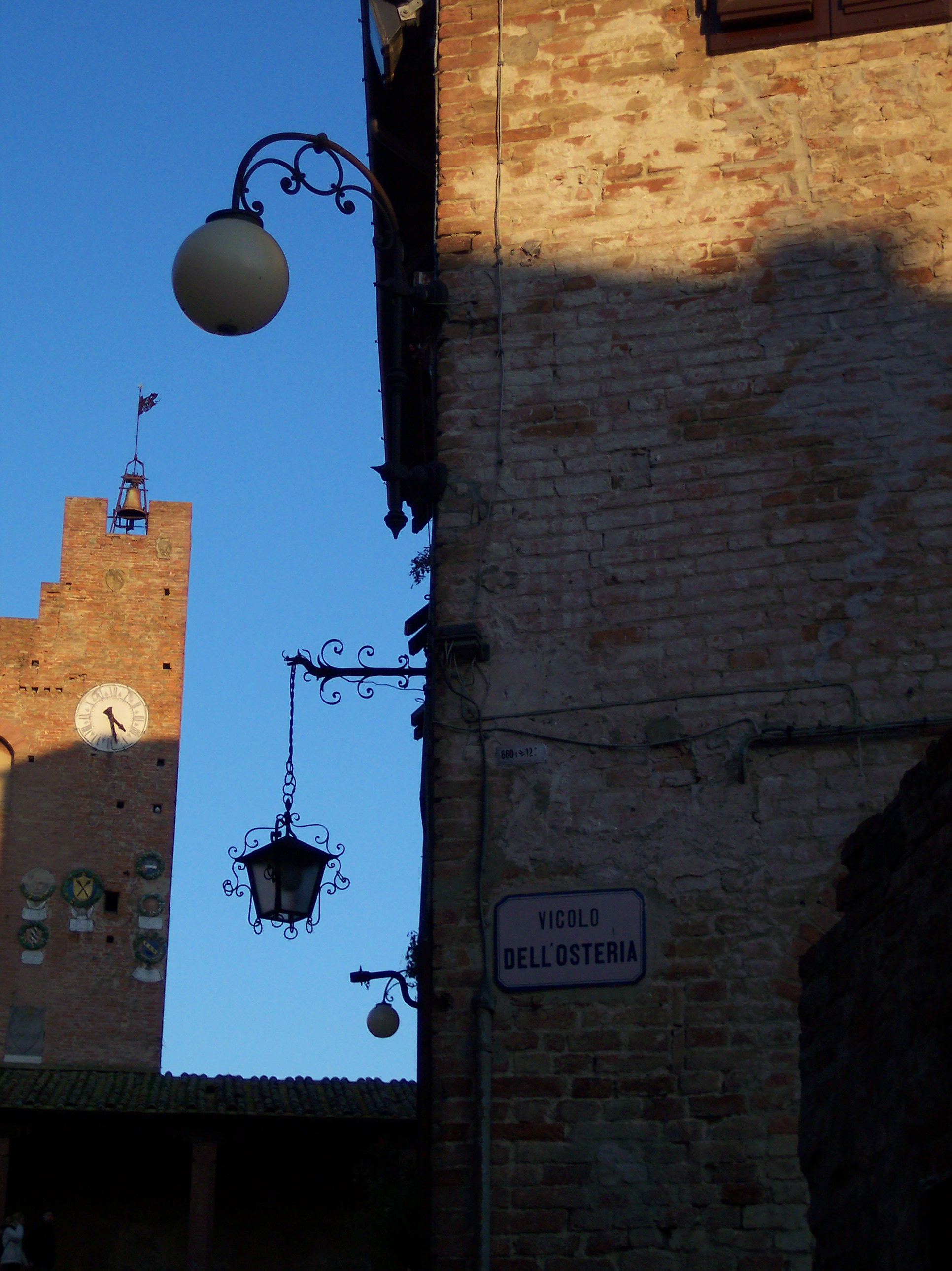 Certaldo, Toscana, Italia